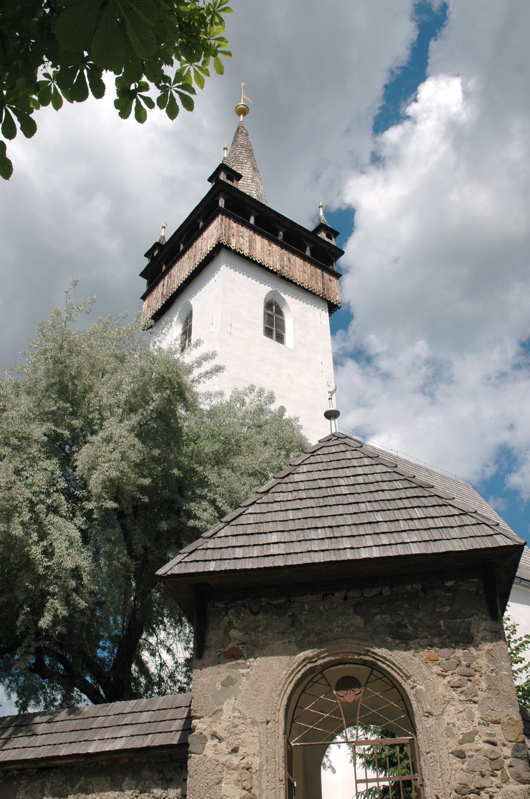 A református templom Huszt (Kárpátalja), Ukrajna